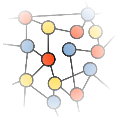 Exemple de graphe infini